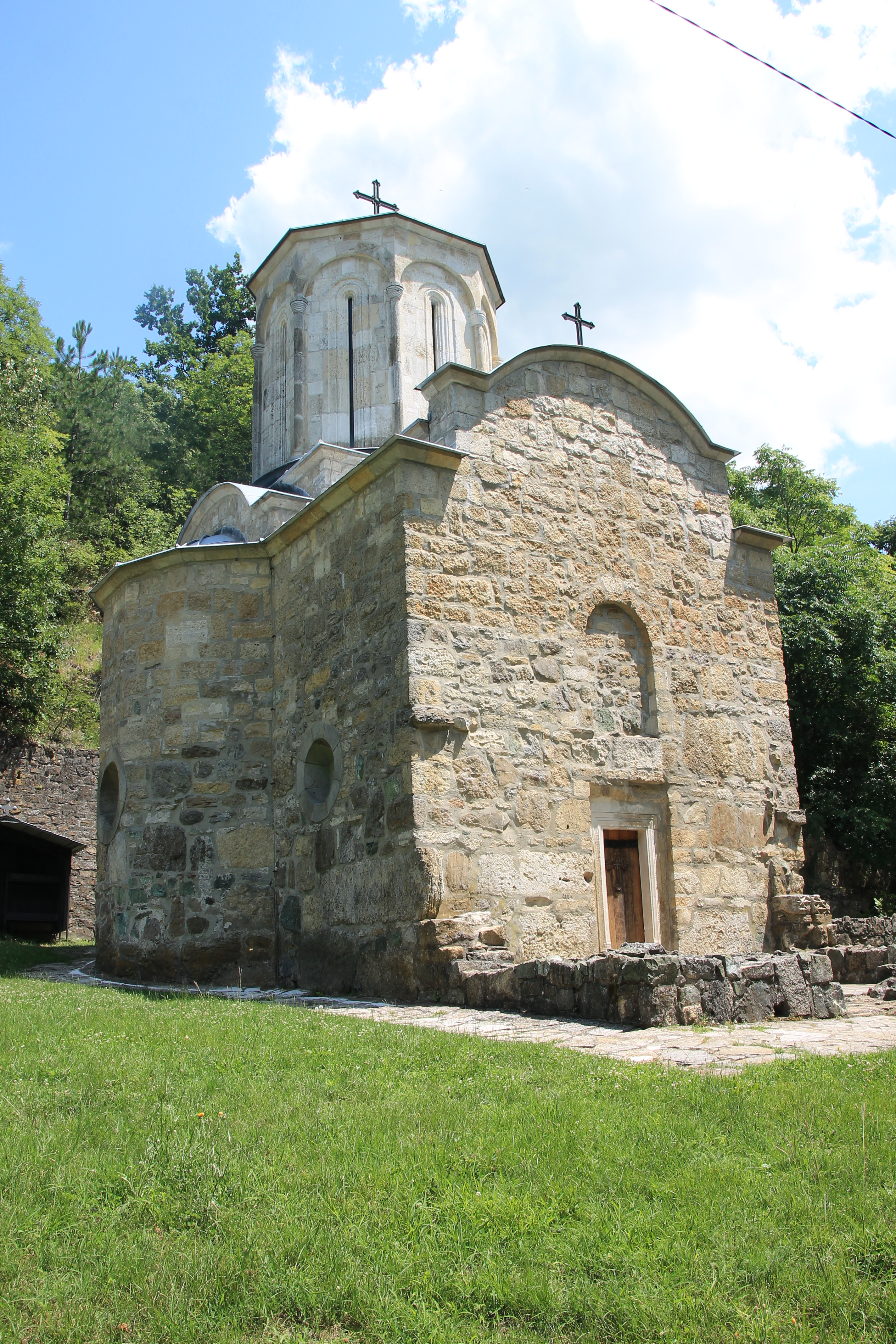 Manastir Pavlovac